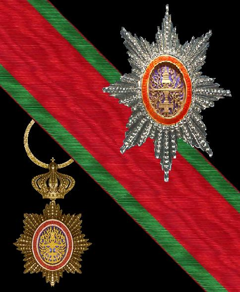 Ster, lint en juweel van de Koninklijke Orde van Cambodja Eigen tekening